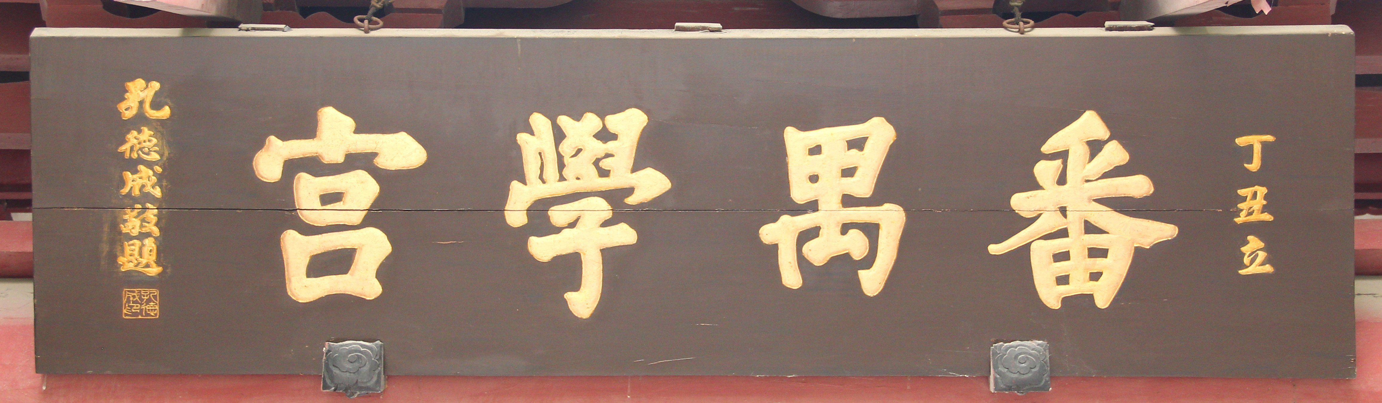 番禺學宮匾。